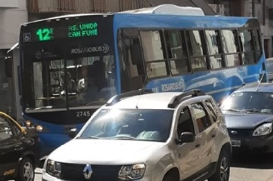 Mercedes-Benz de la línea 125, explotada por la empresa Rosario Bus. En la cartelera, se ve uno de los destinos "Provincias Unidas y Dean Funes".